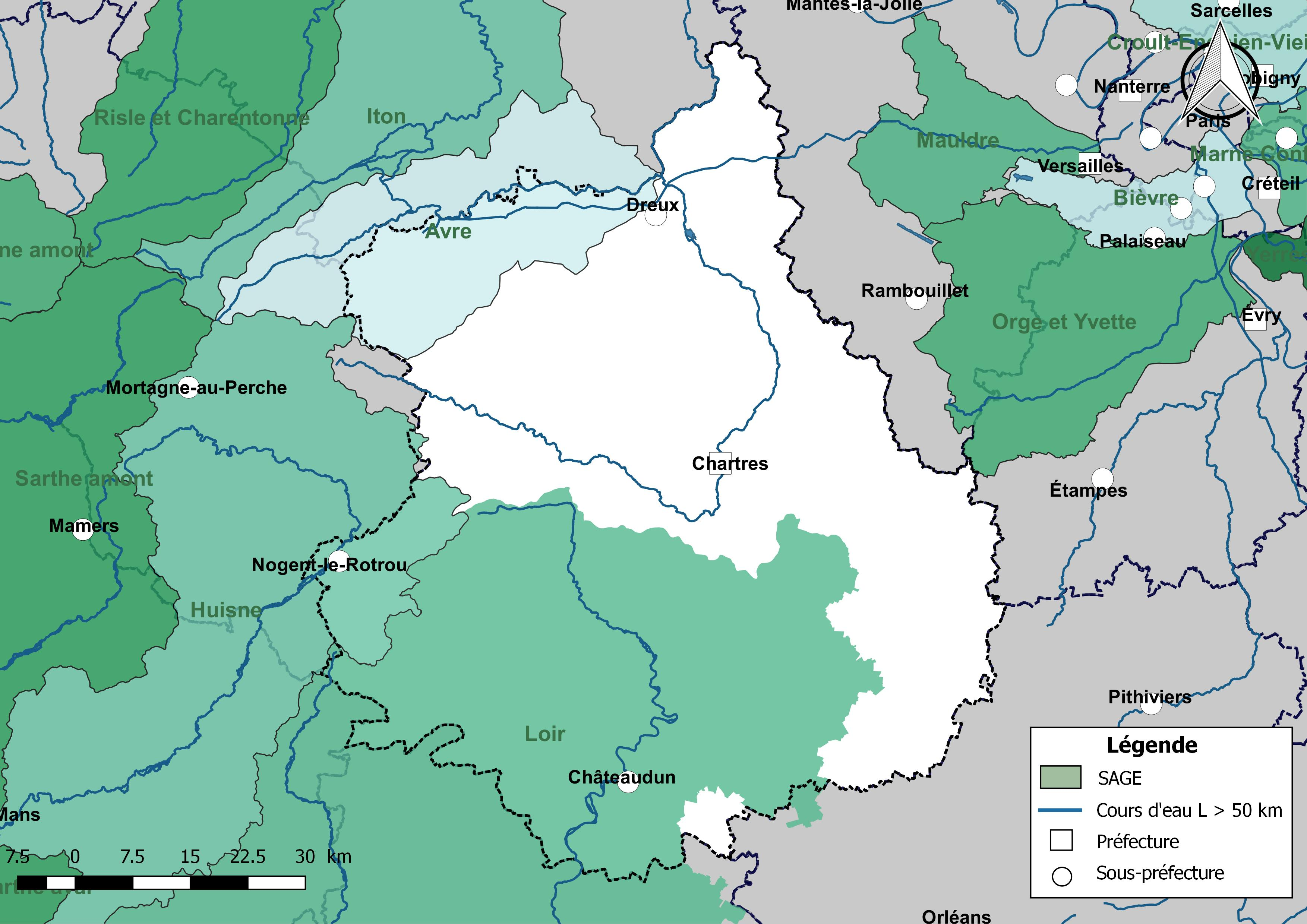 carte des schémas d'aménagement et de gestion des eaux (SAGE) concernant le département d'Eure-et-Loir (France) au 1er janvier 2018.